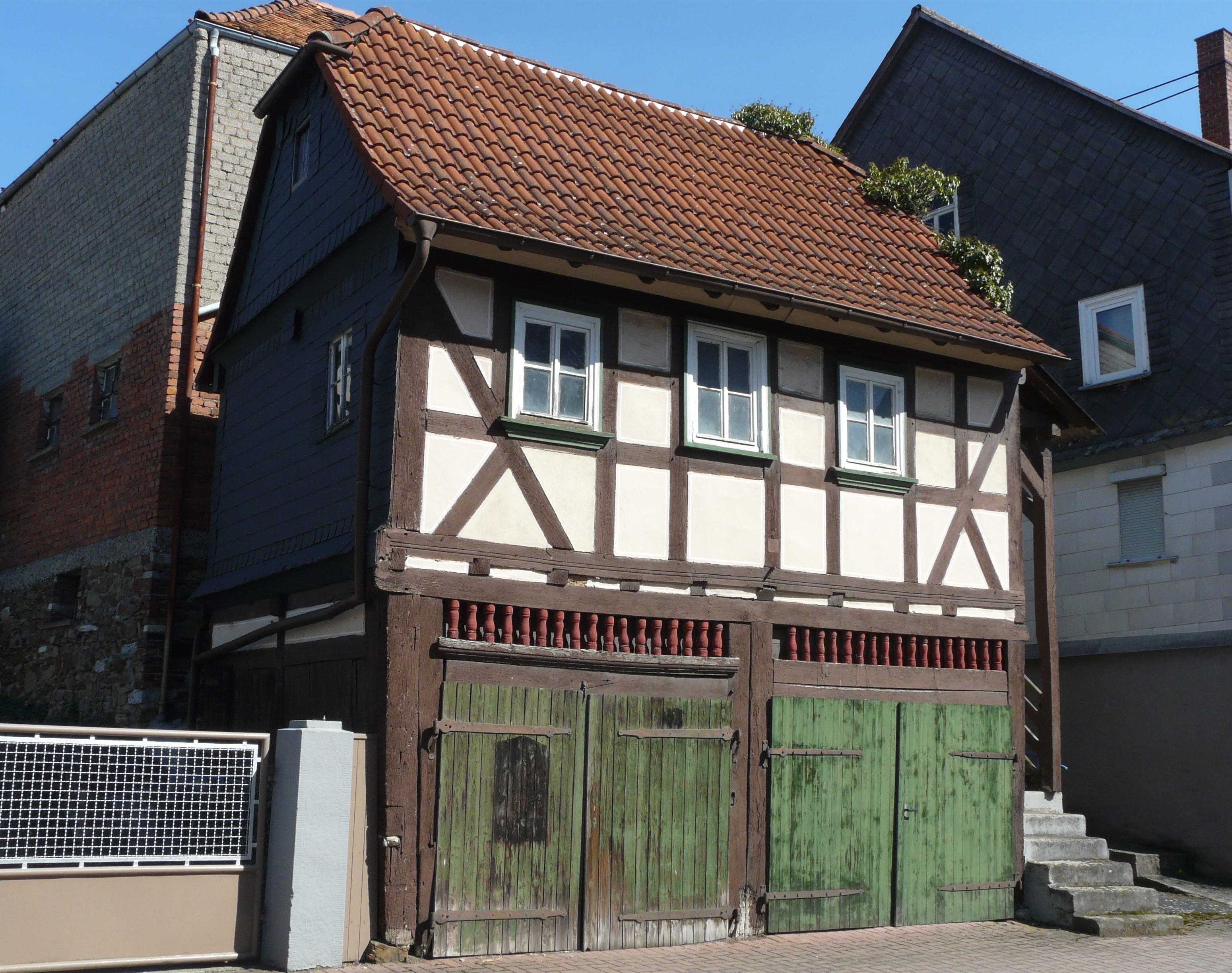 Das Spritzenhaus in Schöffengrund-Oberwetz, bei Rheinfelser Straße 23